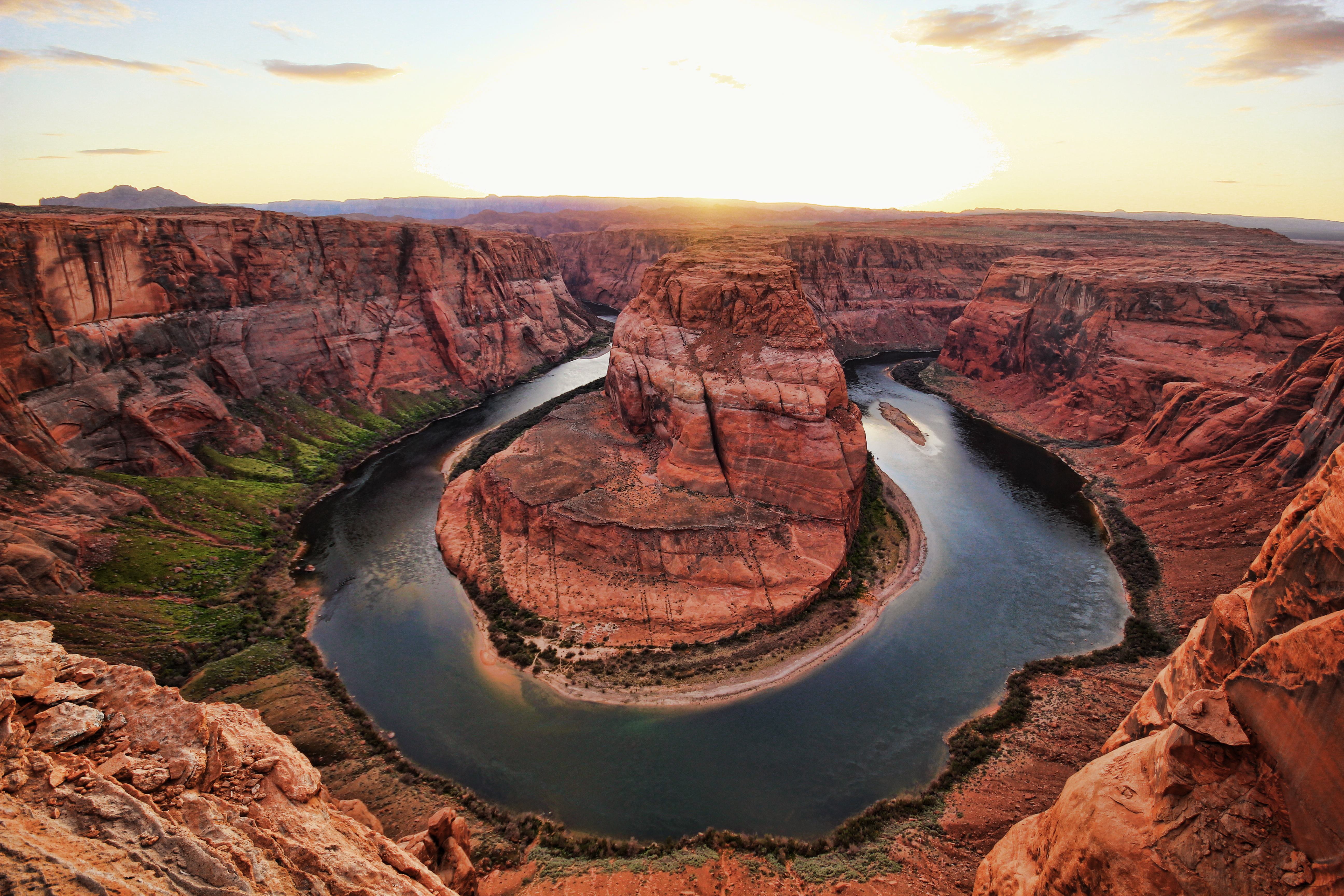 Horseshoe Bend Sunset, HDR Foto aus 3 Aufnahmen